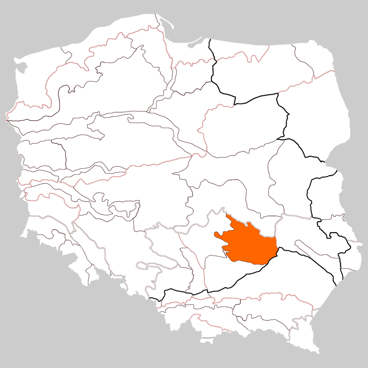 Physico-geographical regionalization of Poland Macroregion 342.3 Kielce Upland Regionalizacja fizycznogeograficzna Polski Makroregion 342.3 Wyżyna Kielecka